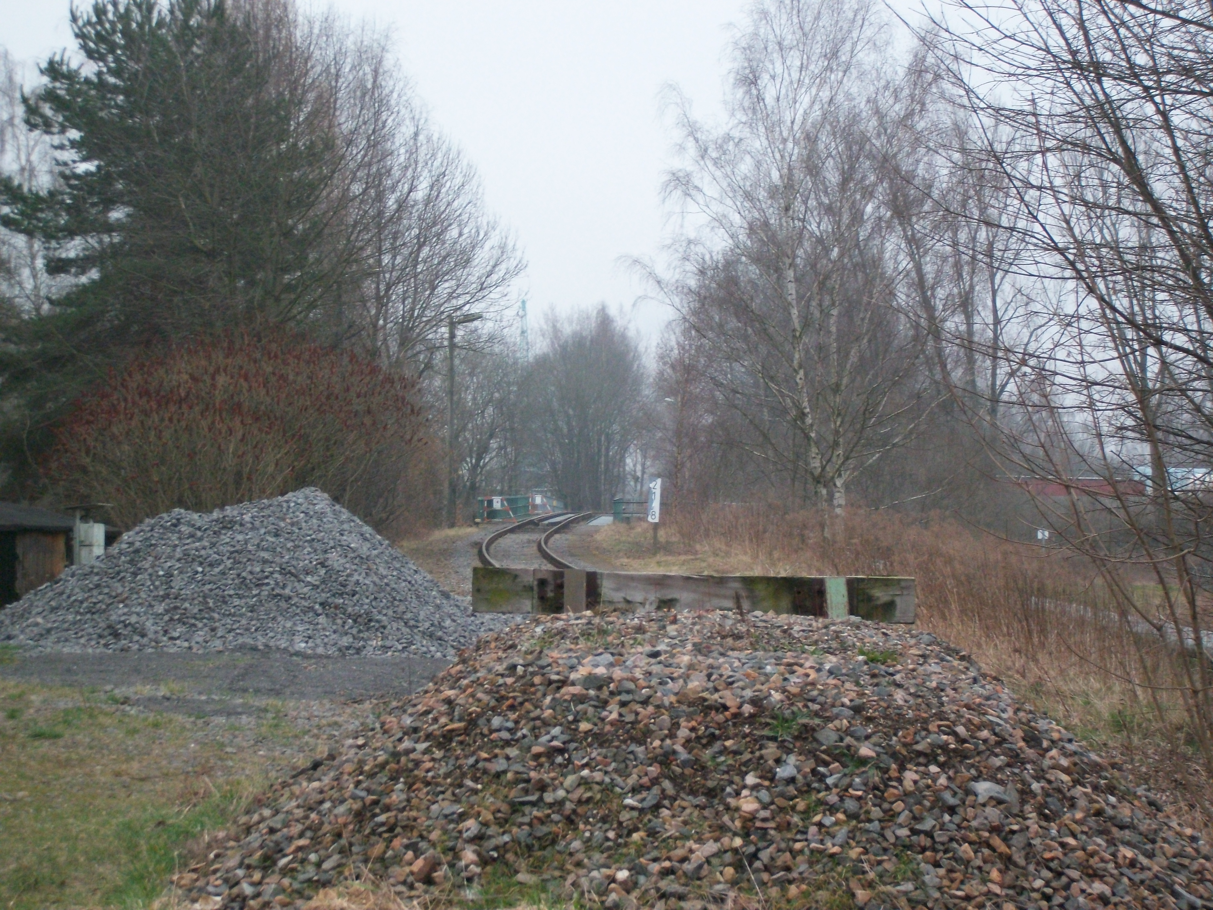 ehem. Chemnitztalbahn beim Bahnhof Glösa